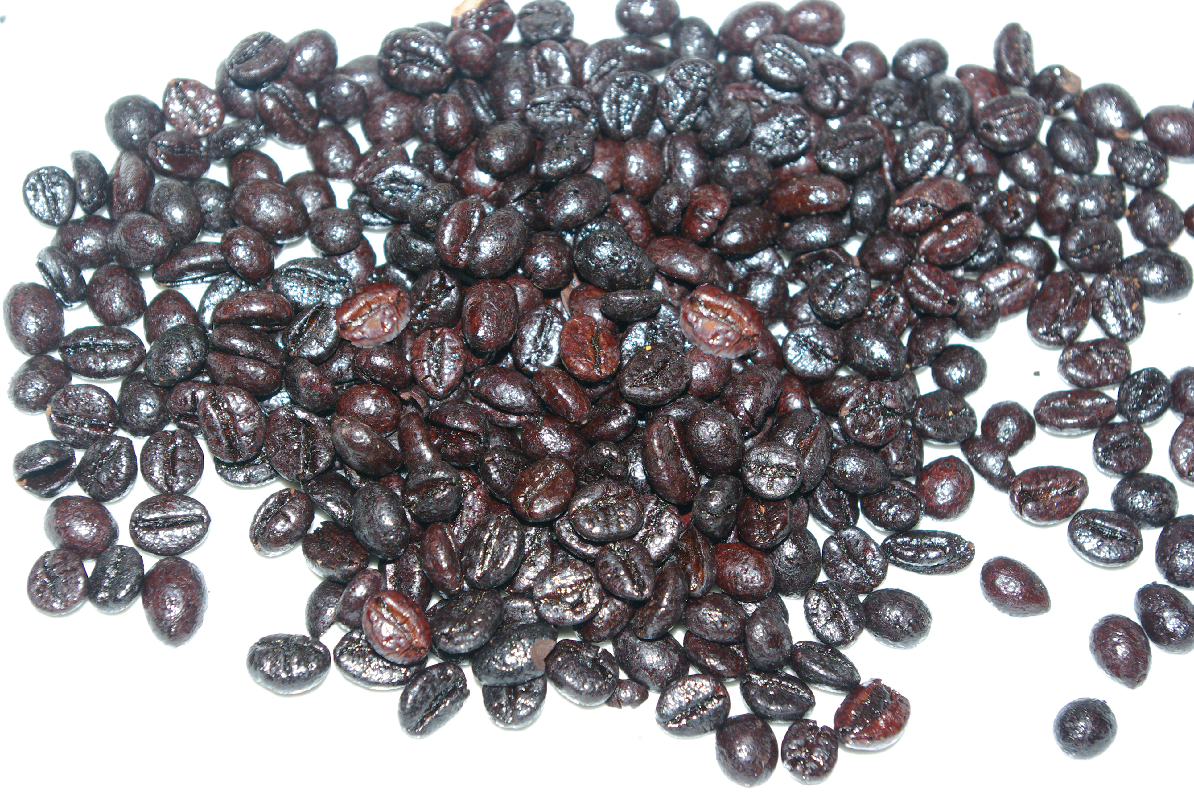 Café tostado con adición de azucar.